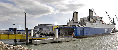 Roulier en attente de déchargeemnt - La Pallice - La Rochelle Photo issue de ma banque d'images personnelle : Pep.per